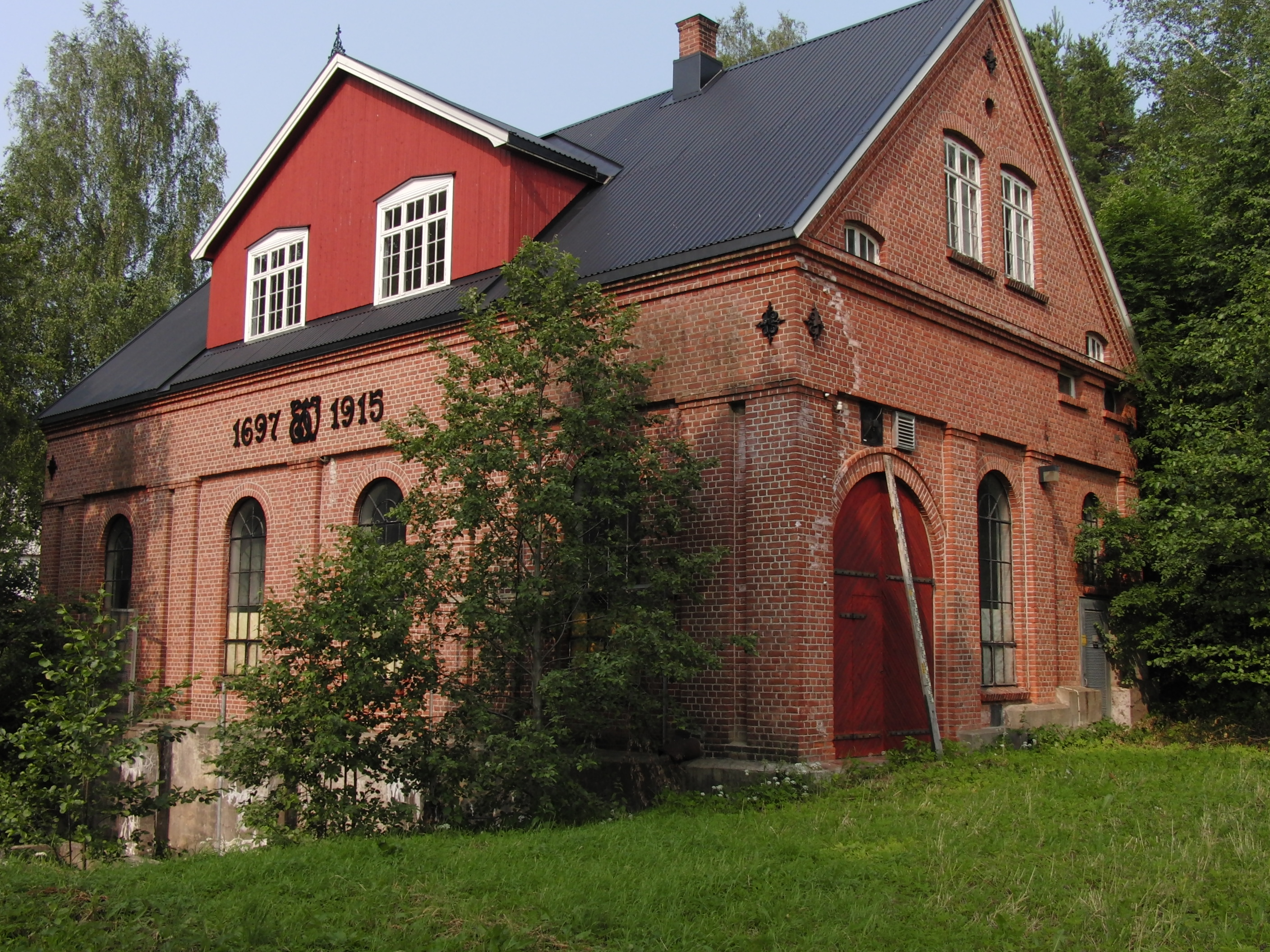 Eidsfoss kraftverk Vestfold